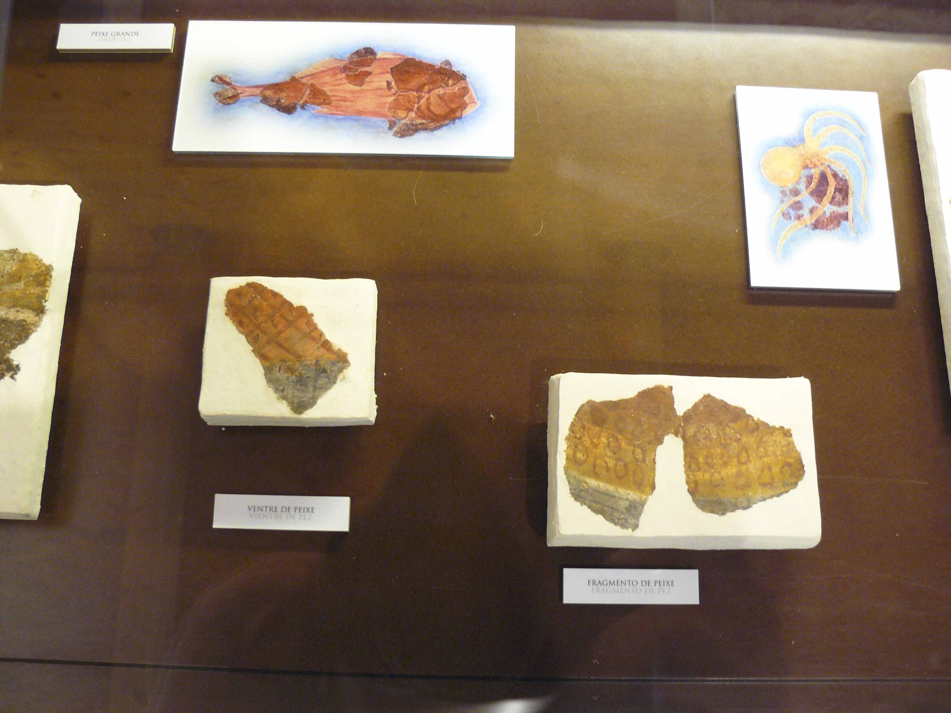 Restos das pinturas da Vila romana de Cambre